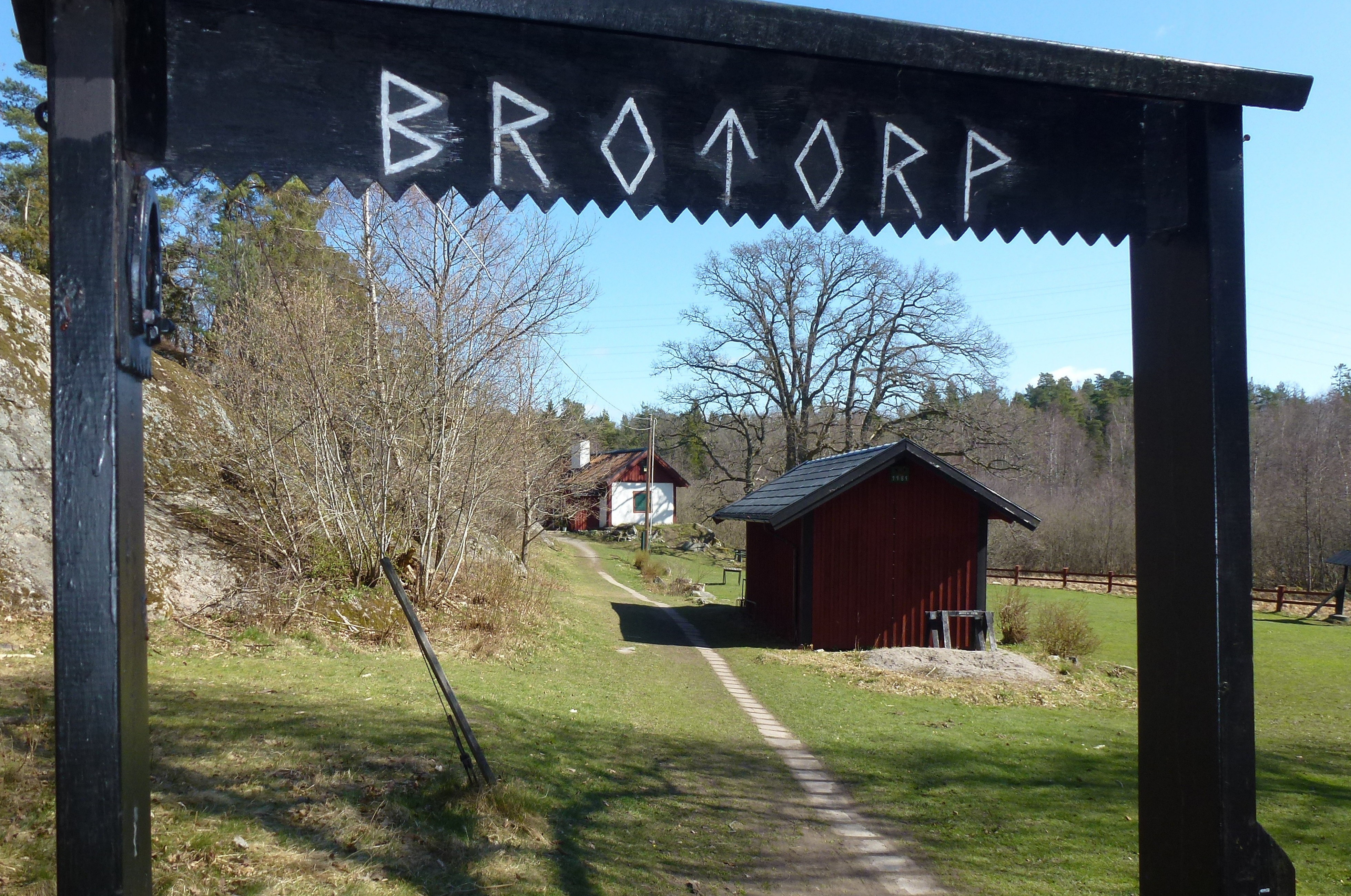 Soldattorpet Brotorp, Skarpnäck